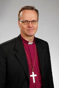 Espoon hiippakunnan piispa Tapio Luoma